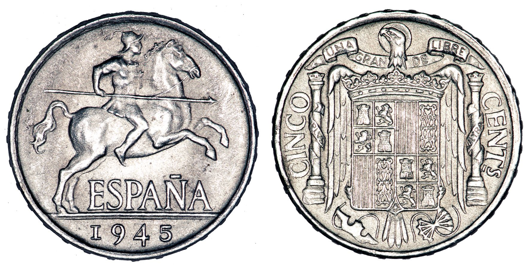 5 Céntimos 1945